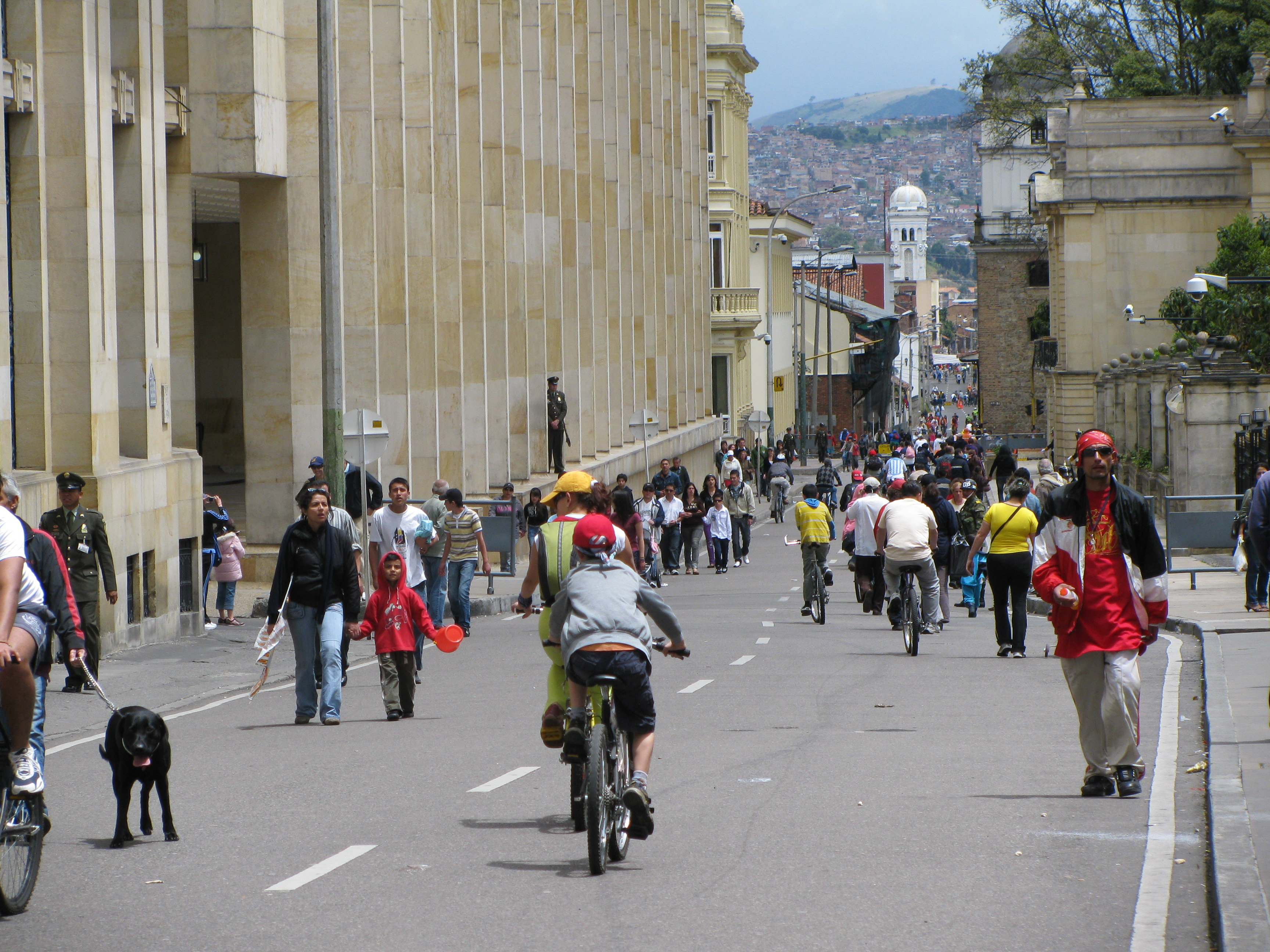 Ciclovia em Bogotá